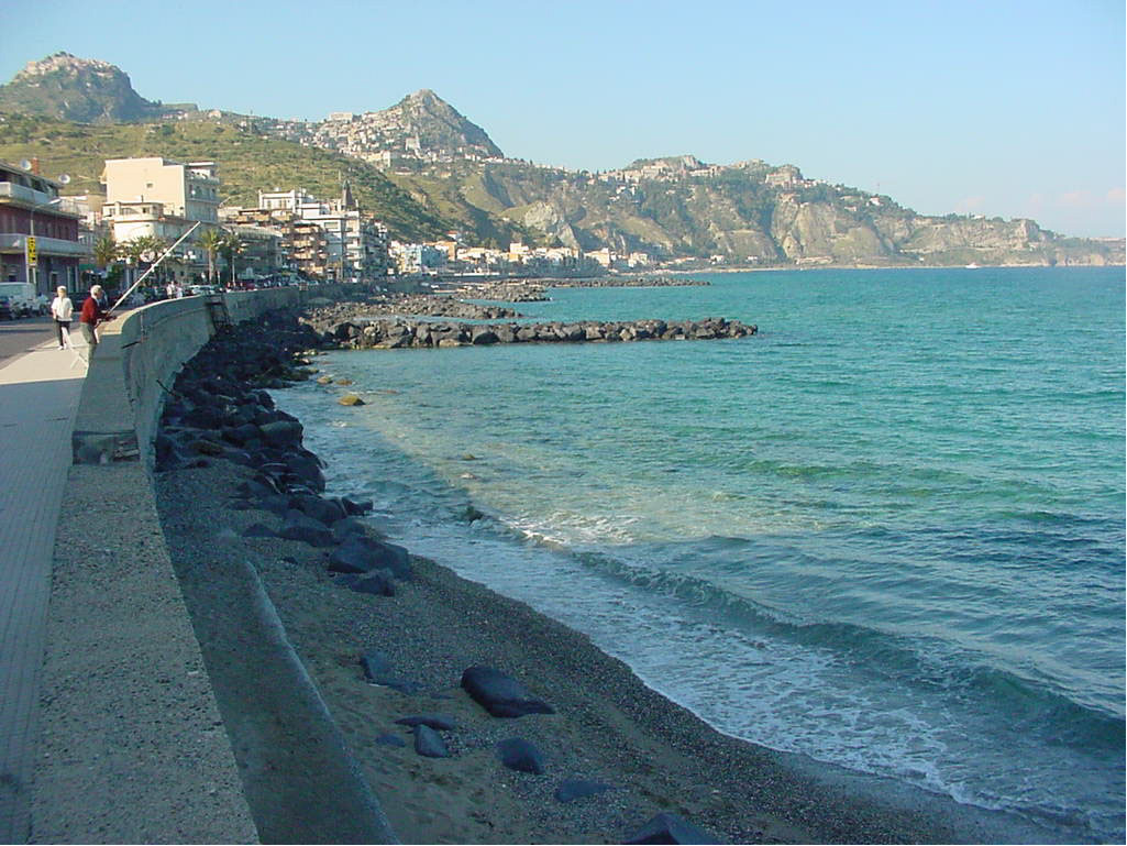 Jordi Serra